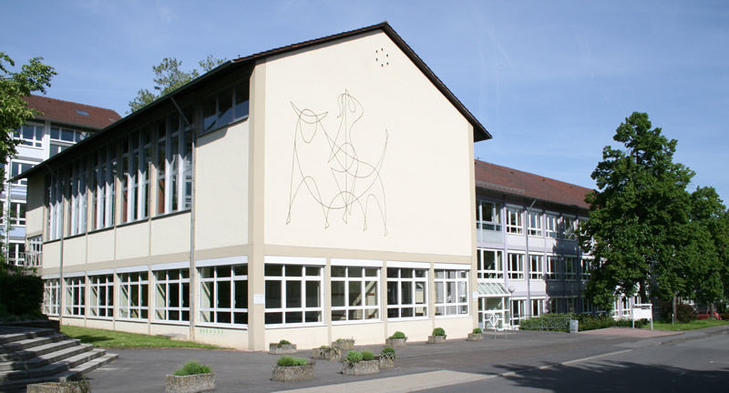 KSTBB Bild - Kaufm. Schule TBB --- Kaufmännische Schule Tauberbischofsheim